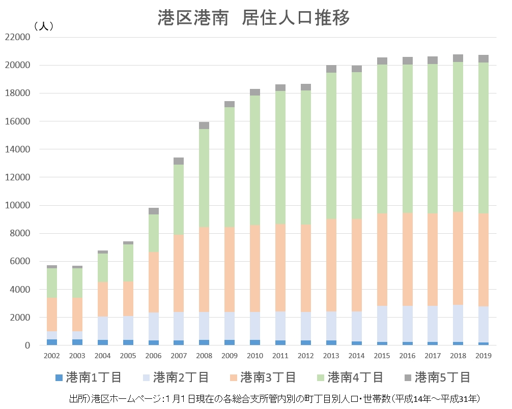 2002年から2019年までの港南（港区）エリア人口